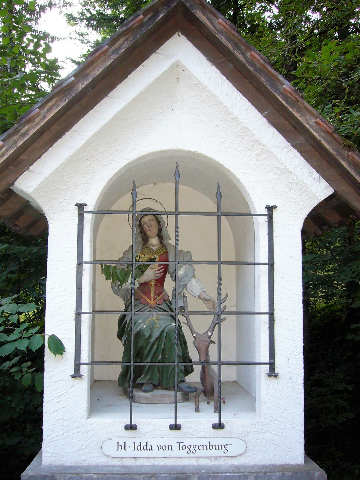 Bildstock der Heiligen Idda bei Au, Gemeinde Fischingen, Kanton Thurgau. Selber fotografiert von Peter Berger, 23. Juli 2006.